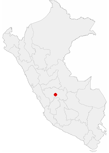 Ubicacion geografica de la Ciudad de Huancayo en el Perú, imagen modificada por Discjockey.